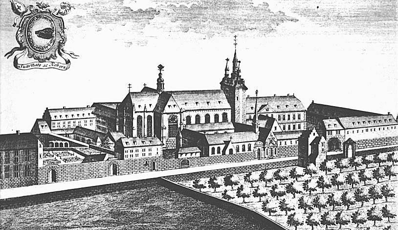 L'abbaye bénédictine de Saint-Laurent de Liège au XVIIIe siècle. Gravure de Saumery.